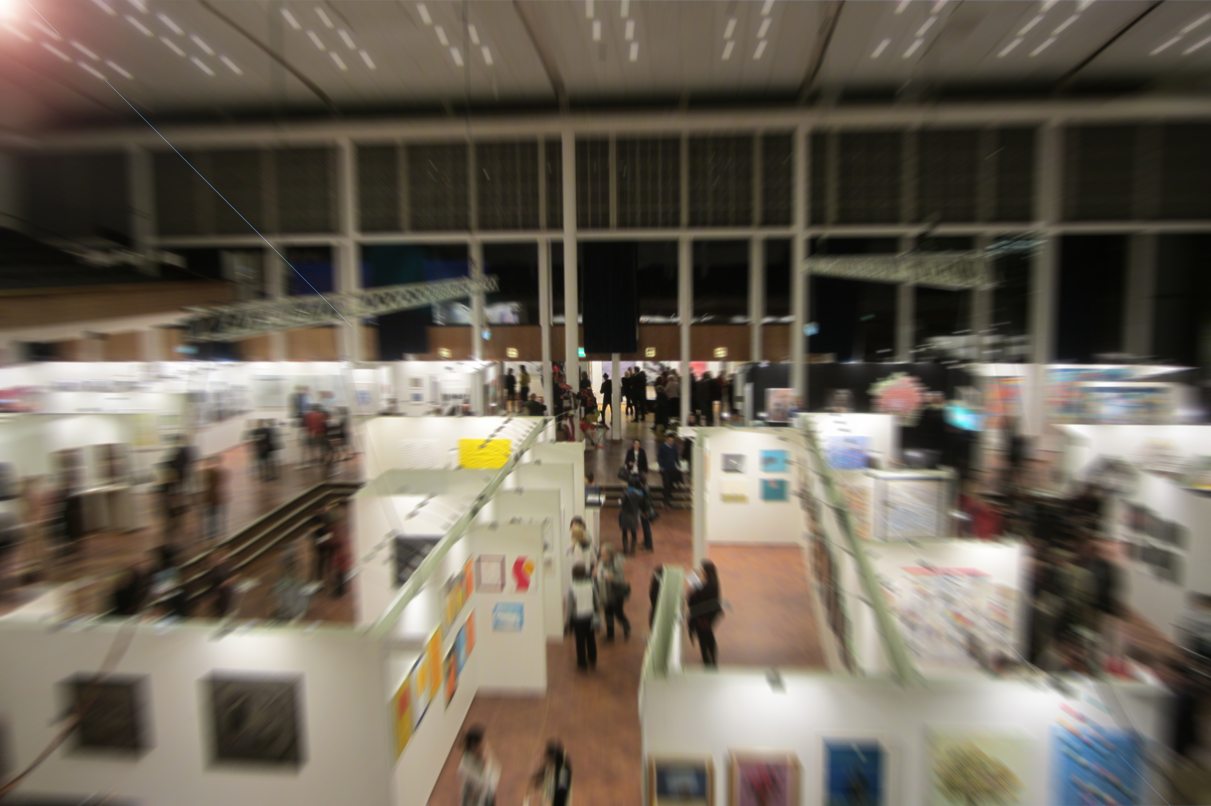 Le Salon d'art à Zurich, Suisse.